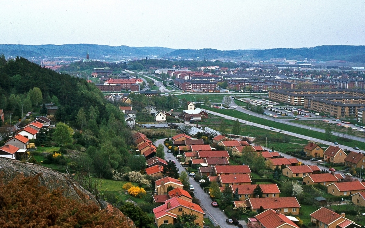 Vy över Safjällsgatan och Wättnegatan i Toltorp, Mölndal, år 1983. I bakgrunden till höger ses även bostadsbebyggelse i Bifrostområdet.